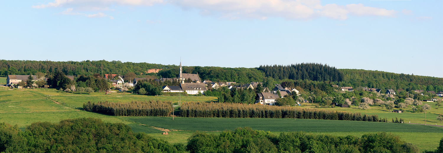 Panorama von Bruschied